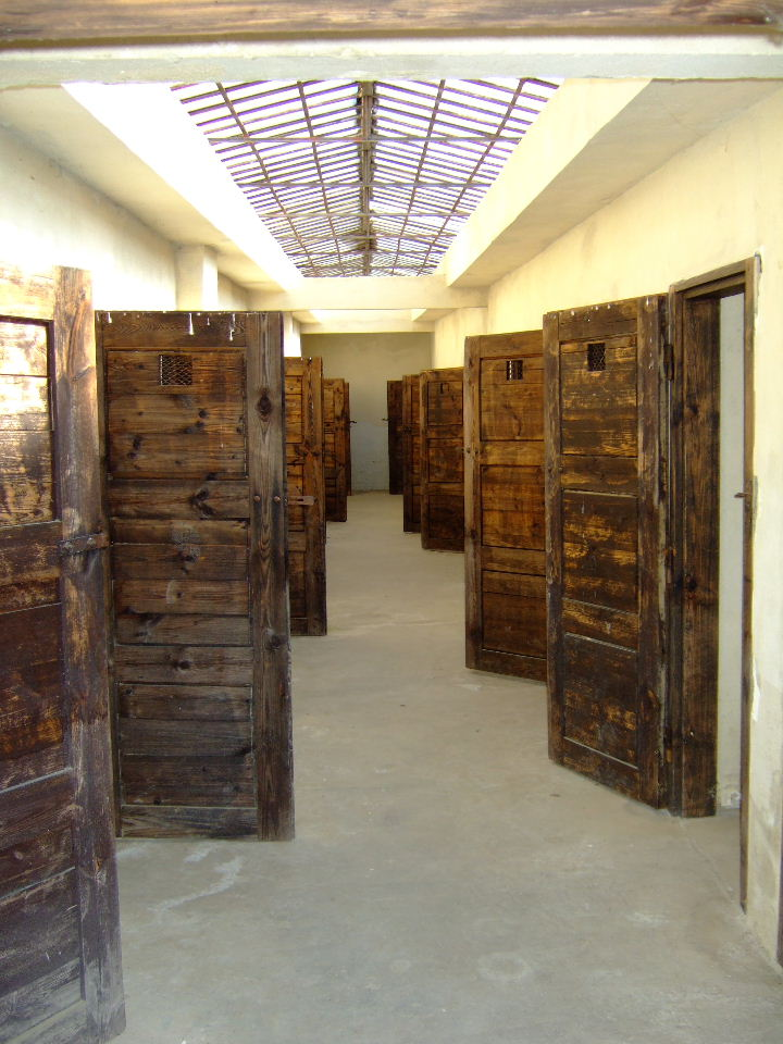 Einzelzellen im Hof IV der Kleinen Festung in Theresienstadt Aufnahme: 1. Juli 2006 Url